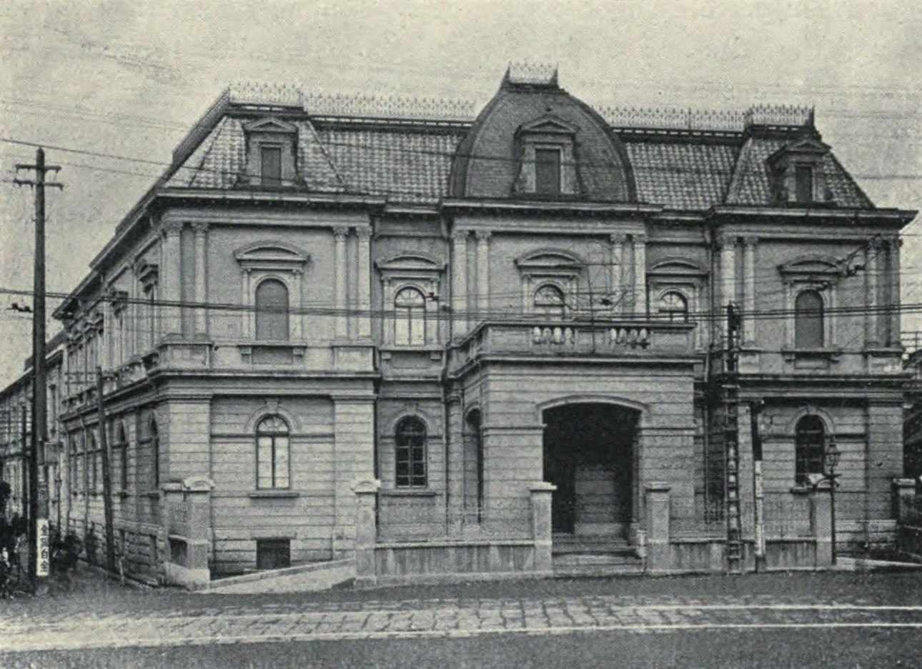 東京株式取引所外観